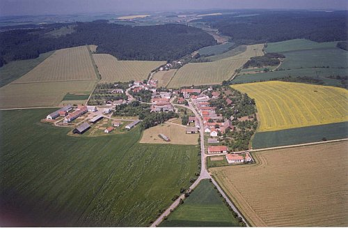 Letecký snímek obce Cidlina